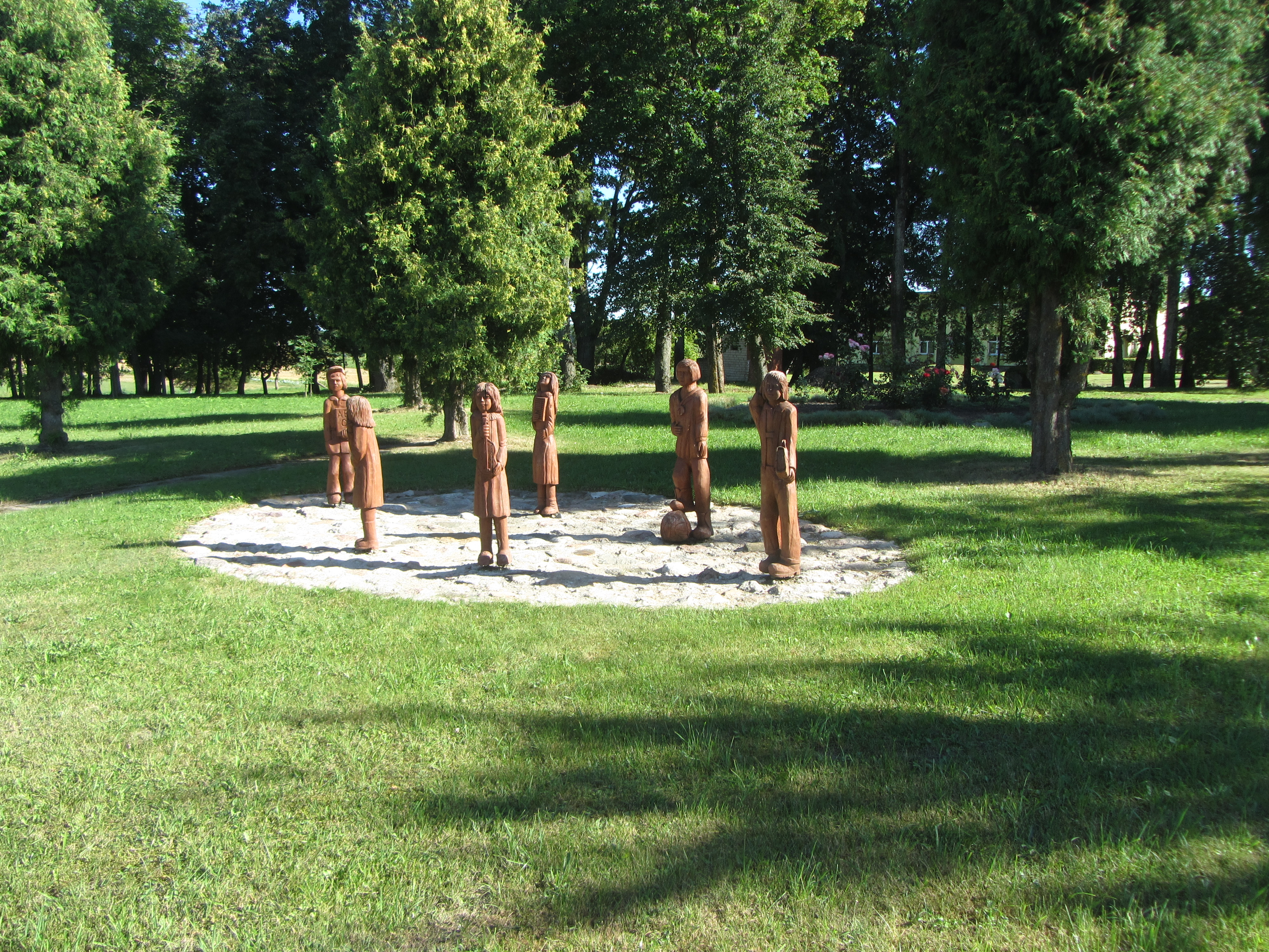 Juodpėnai 40312, Lithuania